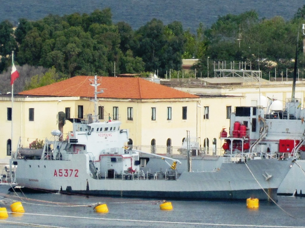 Nave Favignana ormeggiata a Messina